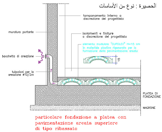 {معلومات ====link My personal site